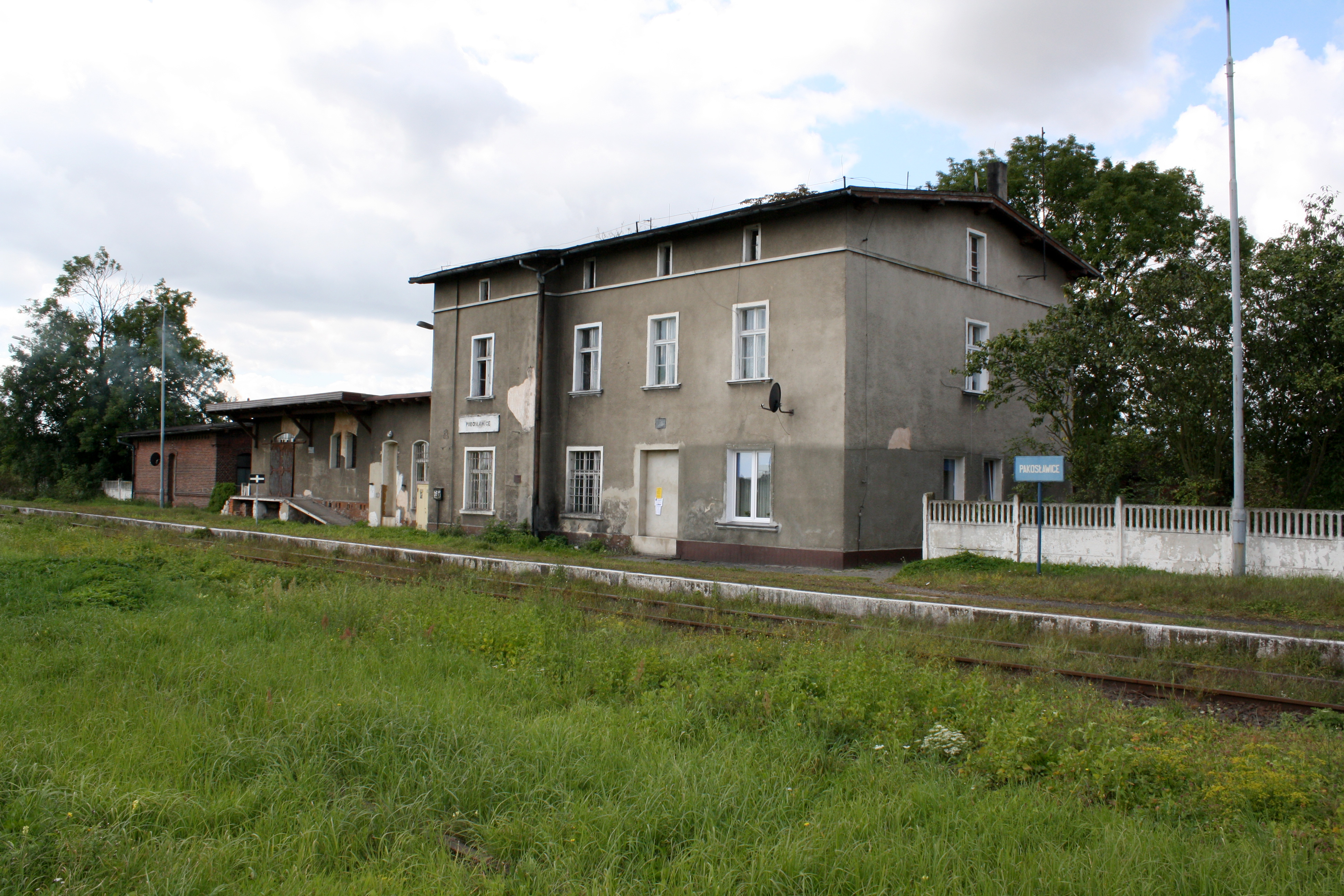 Pakosławice - przystanek kolejowy